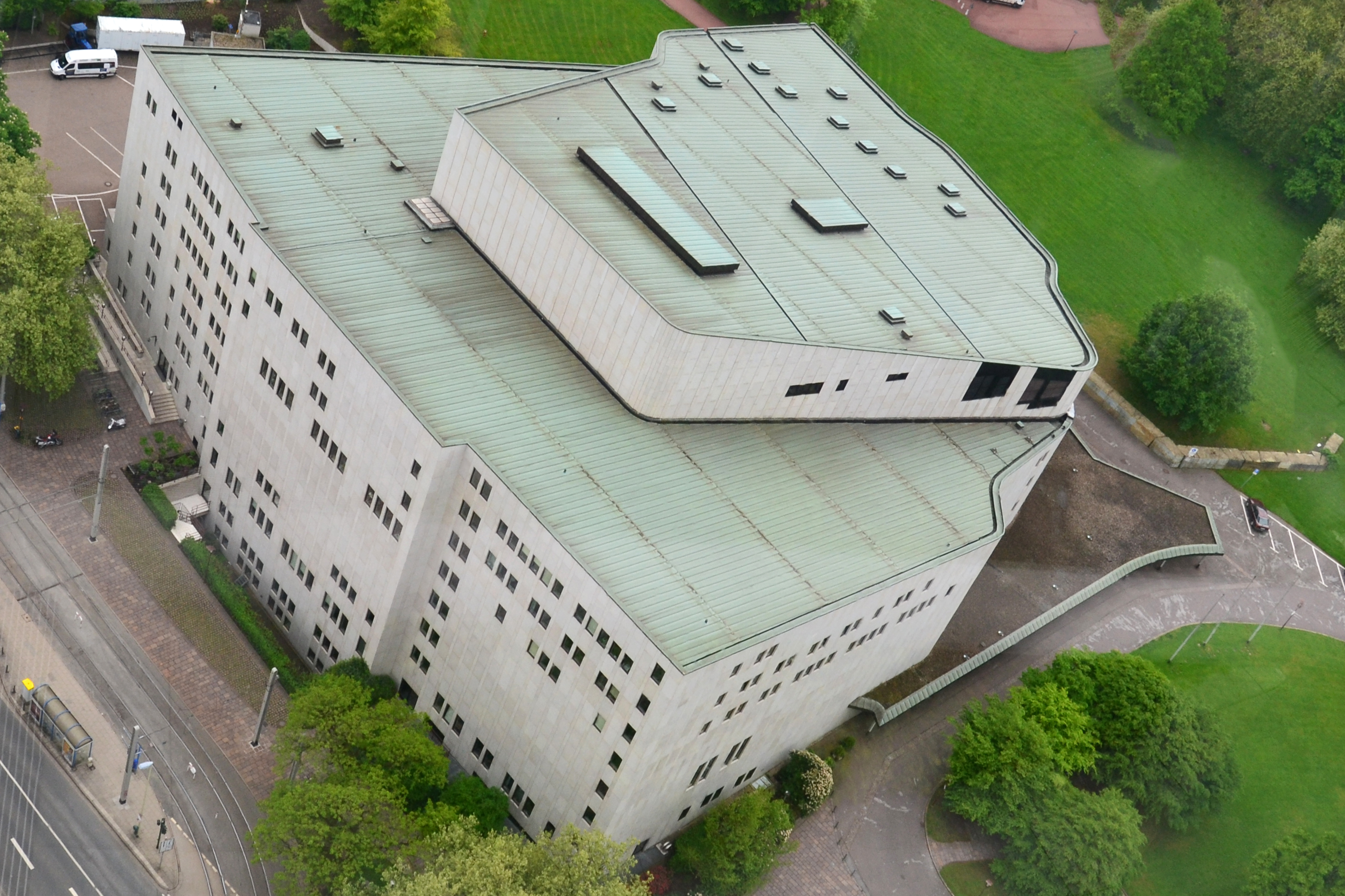 Aalto-Theater in Essen